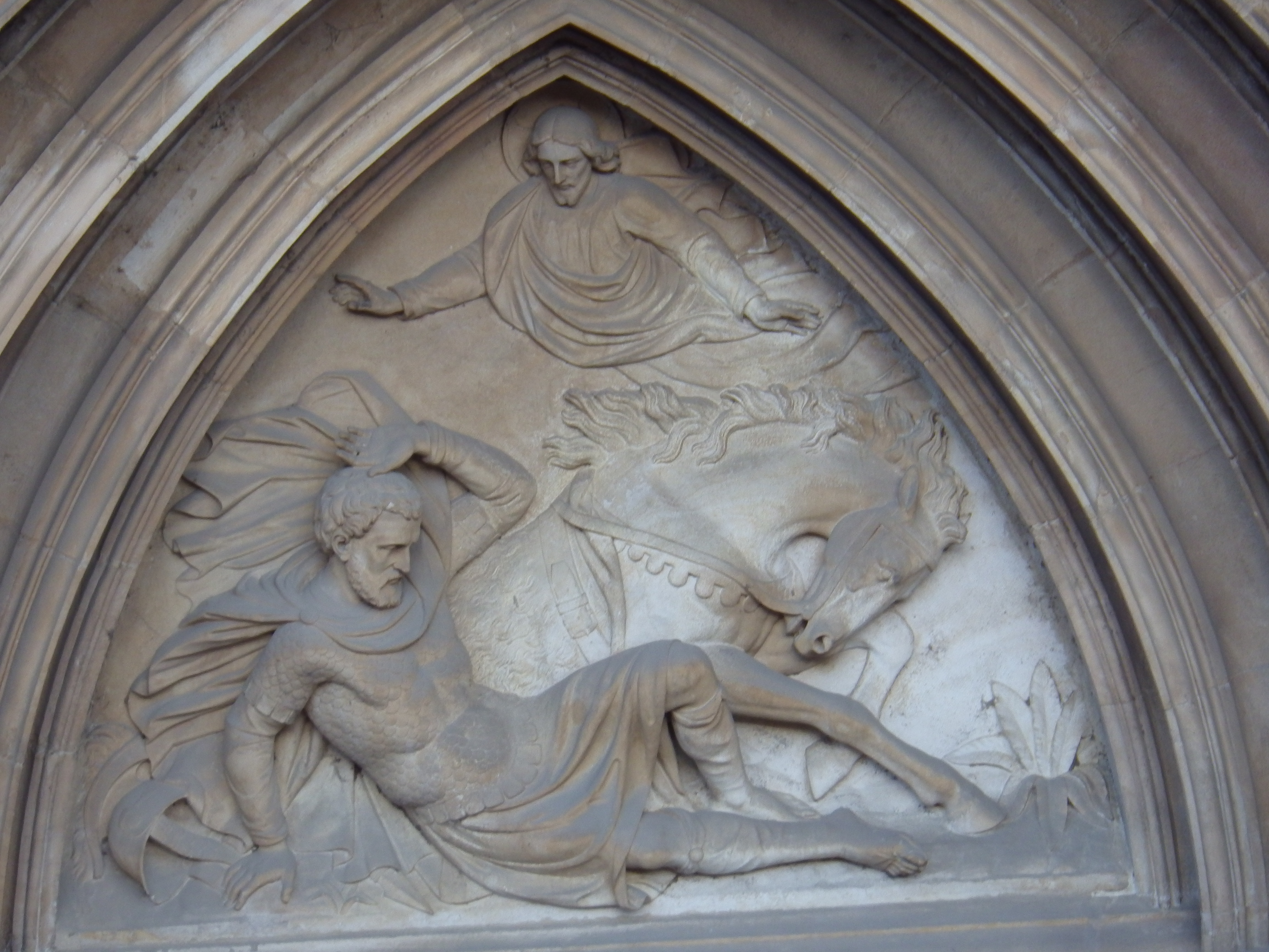 Bas relief dans le tympan de l'église Saint Paul à Lyon, 19èm Siècle